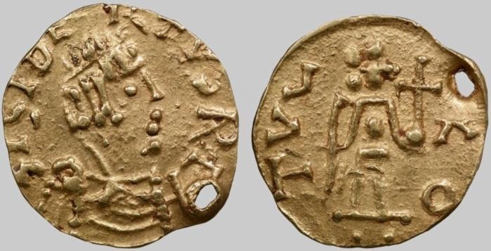 Tiers de sou de Sigebert Ier frappé à Toul. BNF, monnaies, médailles et antiques. Avers : Buste diadémé à droite. Revers : Victoire à droite tenant un globe crucigère ; à l'exergue, deux points.